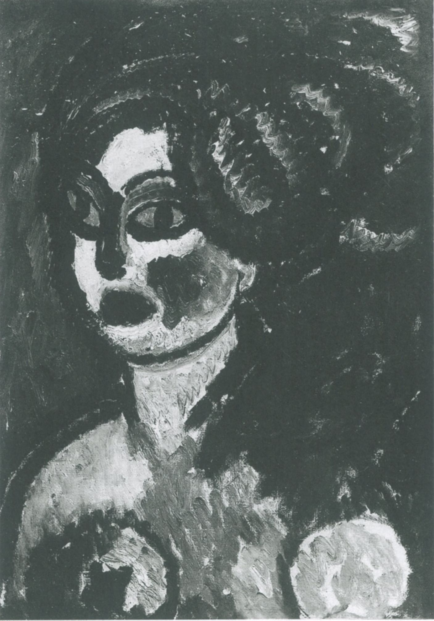 Titel des Gemäldes: "Turandot", Verbleib unbekannt